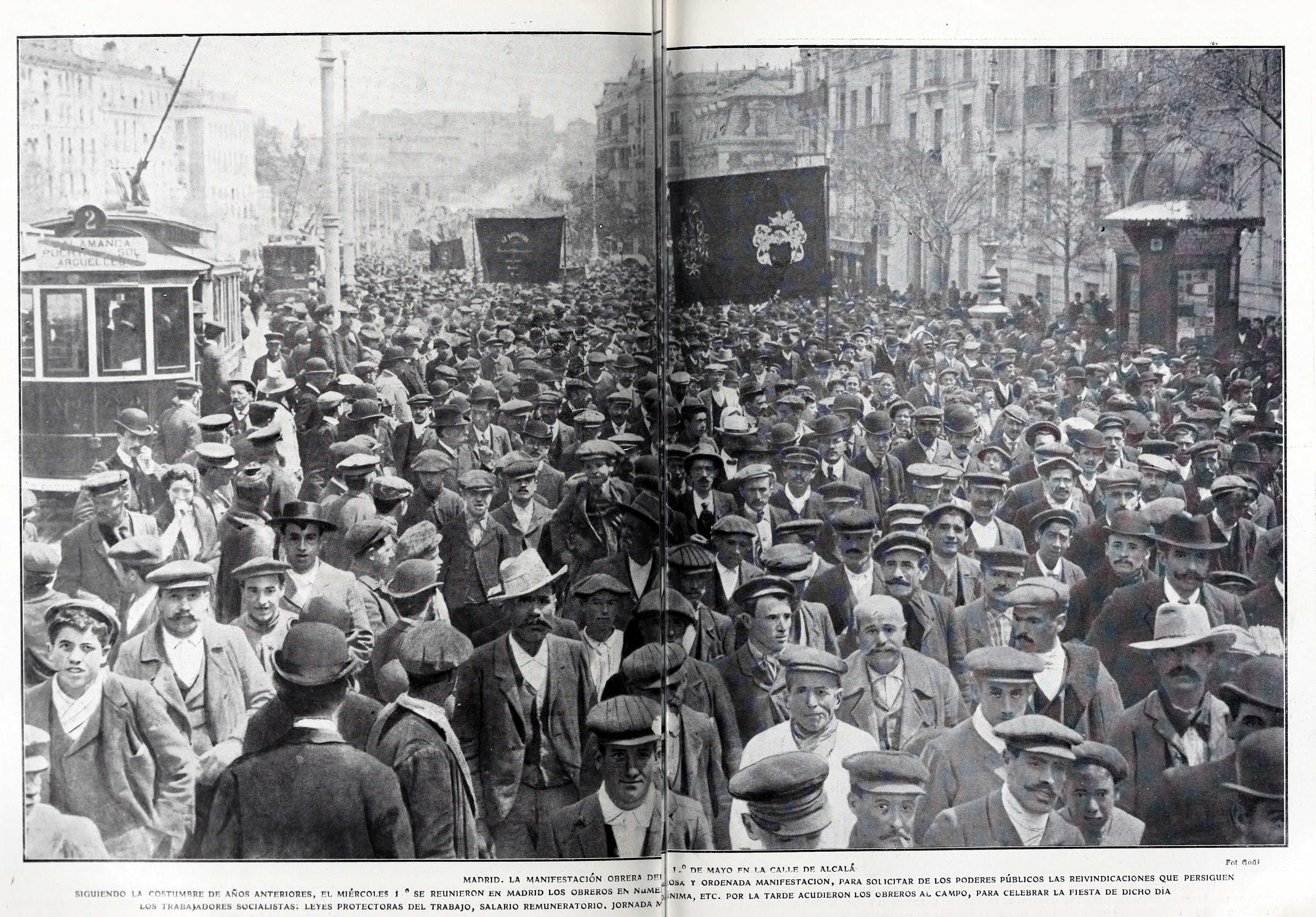 Madrid. La manifestación obrera del 1º de mayo en la calle de Alcalá. Siguiendo la costumbre de años anteriores, el miércoles 1.º se reunieron en Madrid los obreros en numerosa y ordenada manifestación, para solicitiar de los poderes públicos las reivindicaciones que persiguen los trabajadores socialistas: leyes protectoras del trabajo, salario remuneratorio, jornada mínima, etc. Por la tarde acudieron los obreros al campo, para celebrar la fiesta de dicho día.